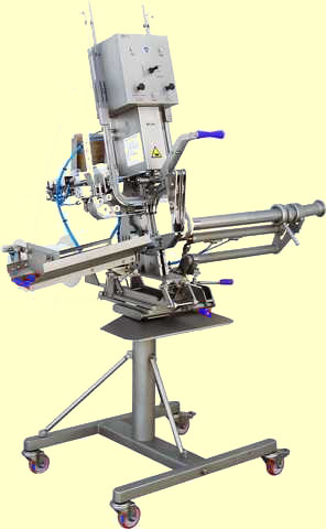 Полуавтоматический клипсатор КОМПО КН-26П